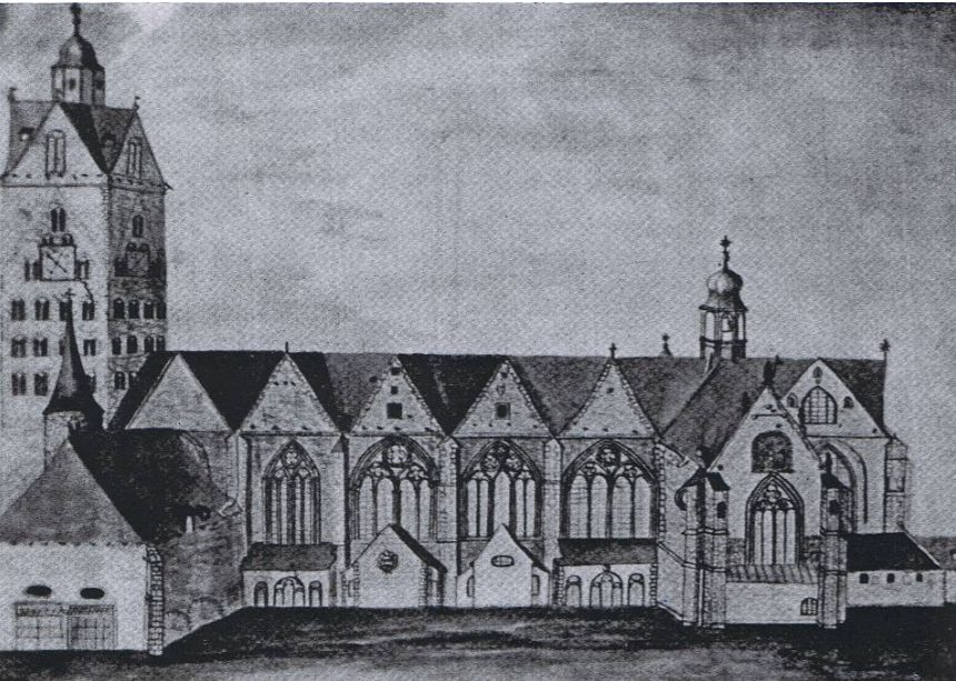 Vorhalle des Paradiesportales des Paderborner Domes nach baulichen Veränderungen durch Ambrosius von Oelde im Jahre 1695. Zeichnung von Gehrken 1815